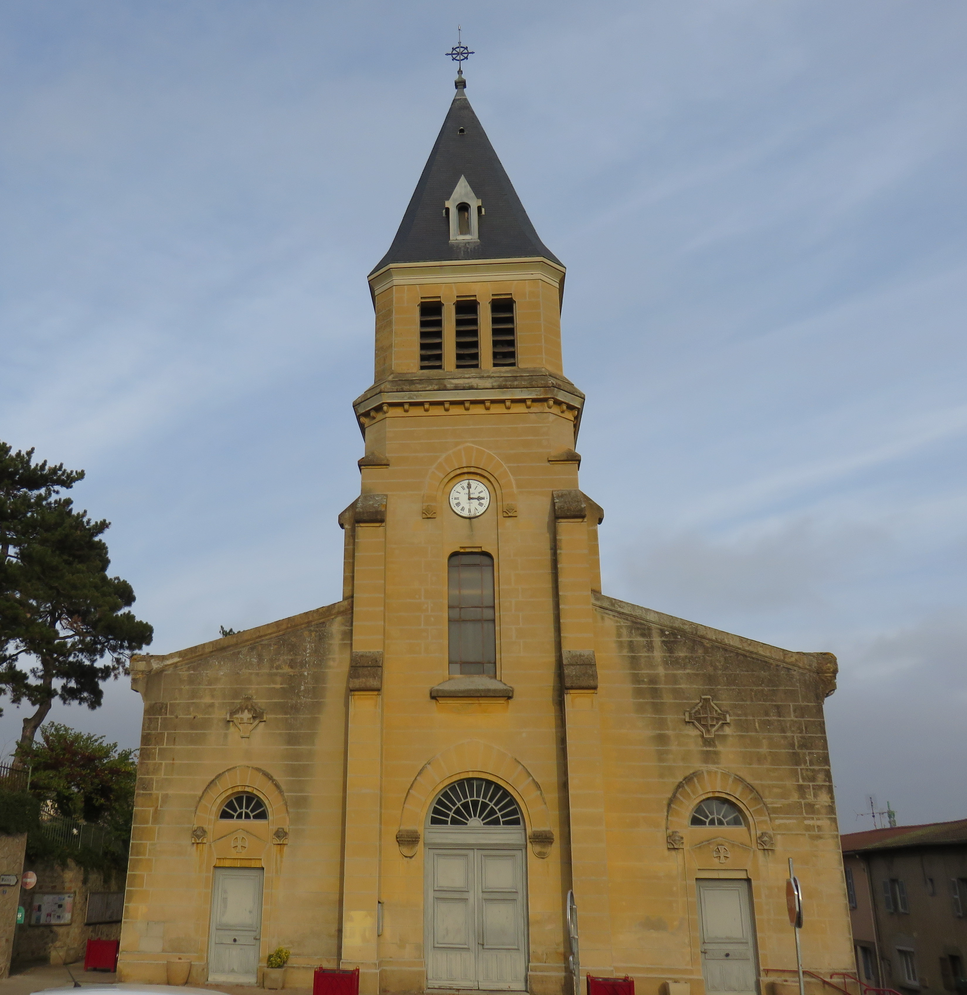 Église Saint-Martin de Thurins (Rhône, France).